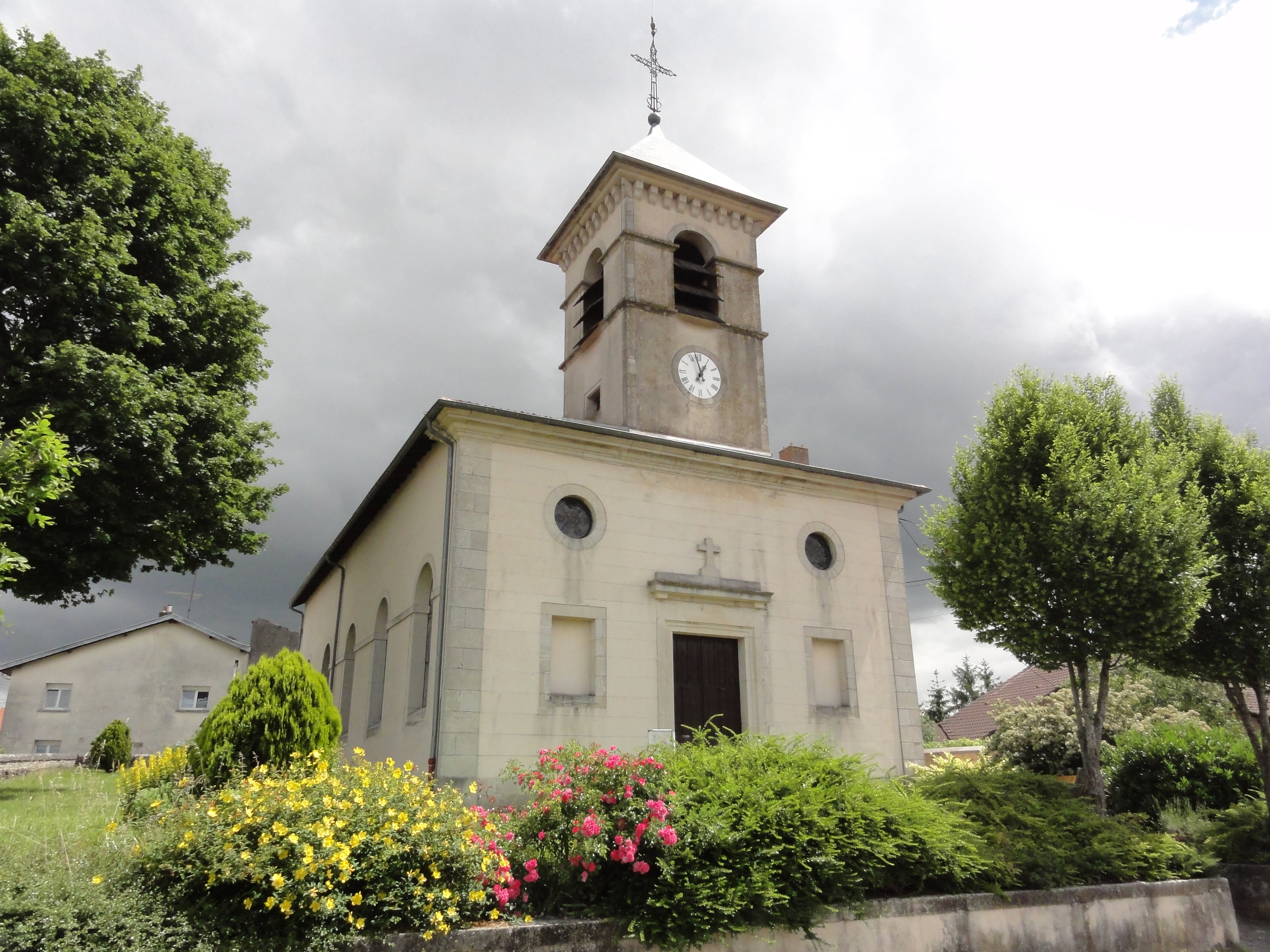 Lemainville(M-et-M) église